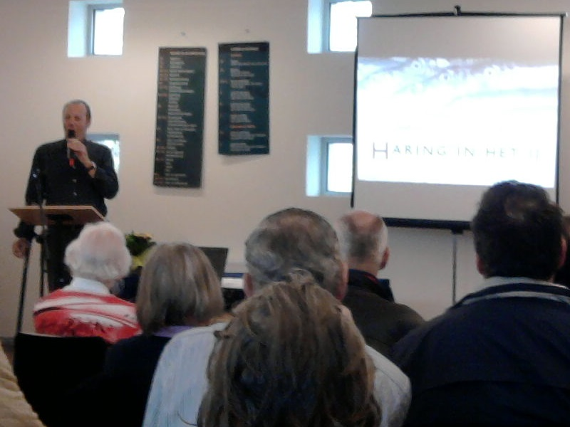 Martin Melchers over haring in het IJ, in Bibliotheek Buitenveldert (OBA), 7 april 2011